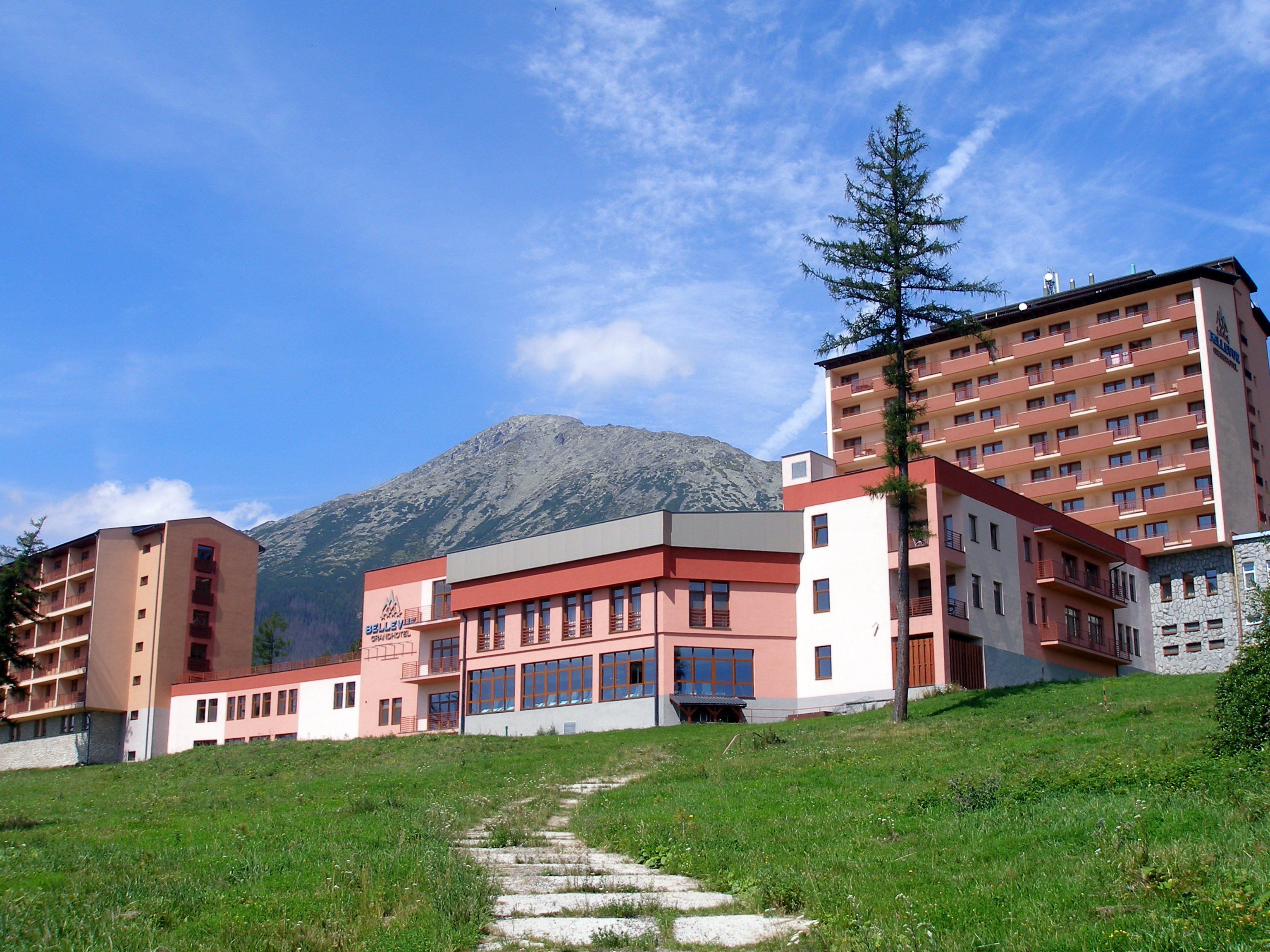 Tatranská osada Horný Smokovec, mesto Vysoké Tatry, okres Poprad.